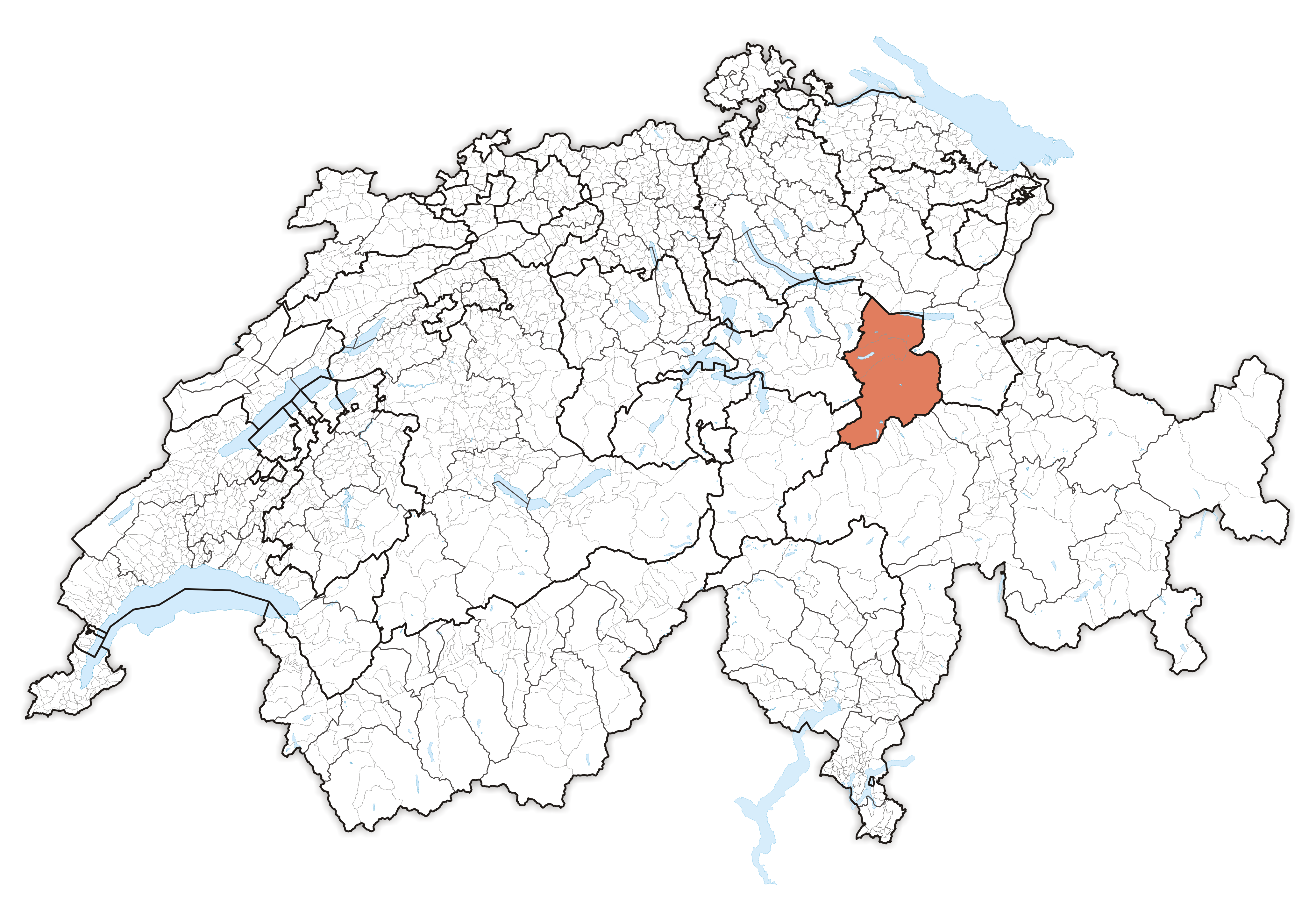 Canton Glarus